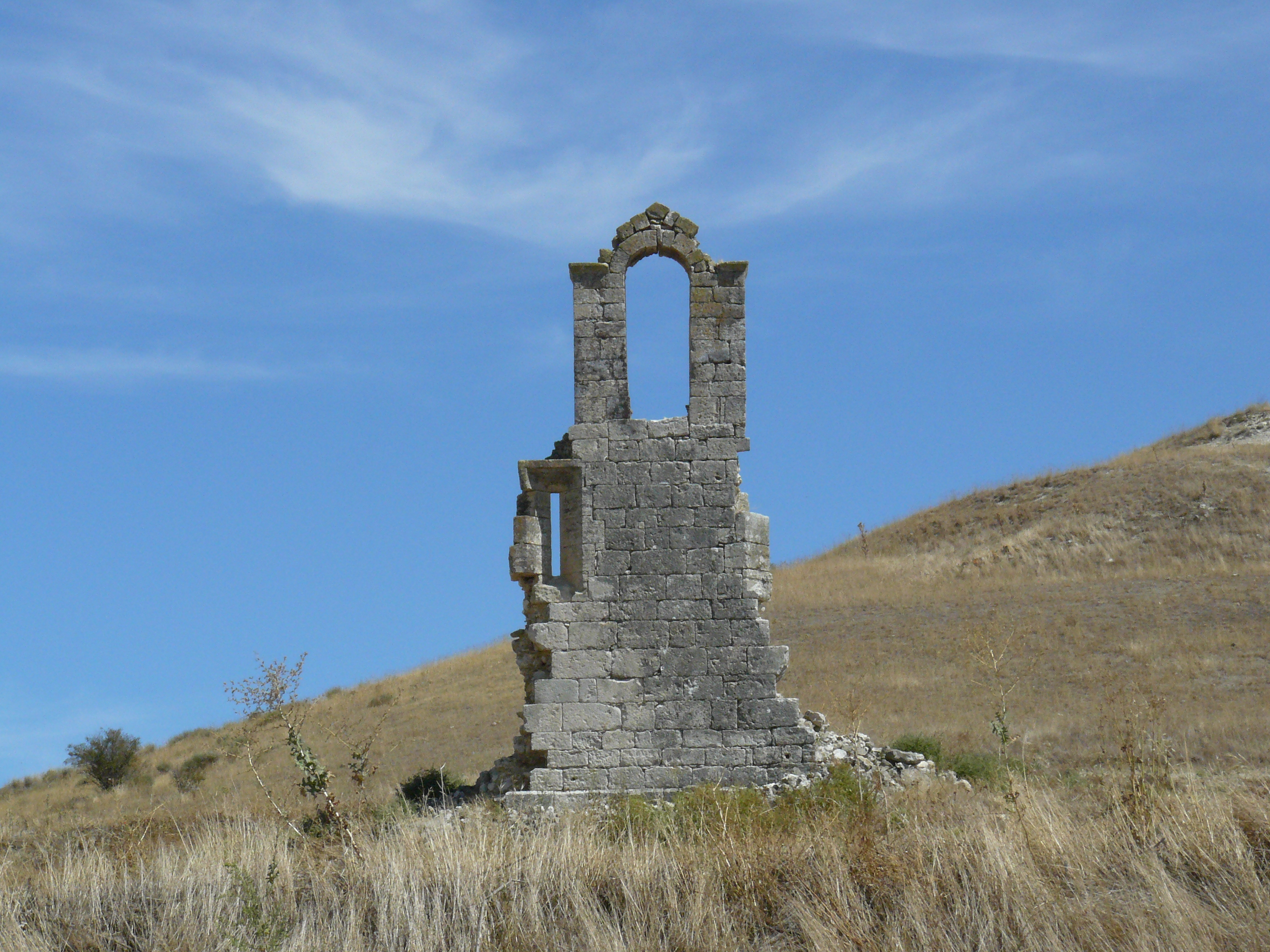 Piña de Esgueva, Valladolid.